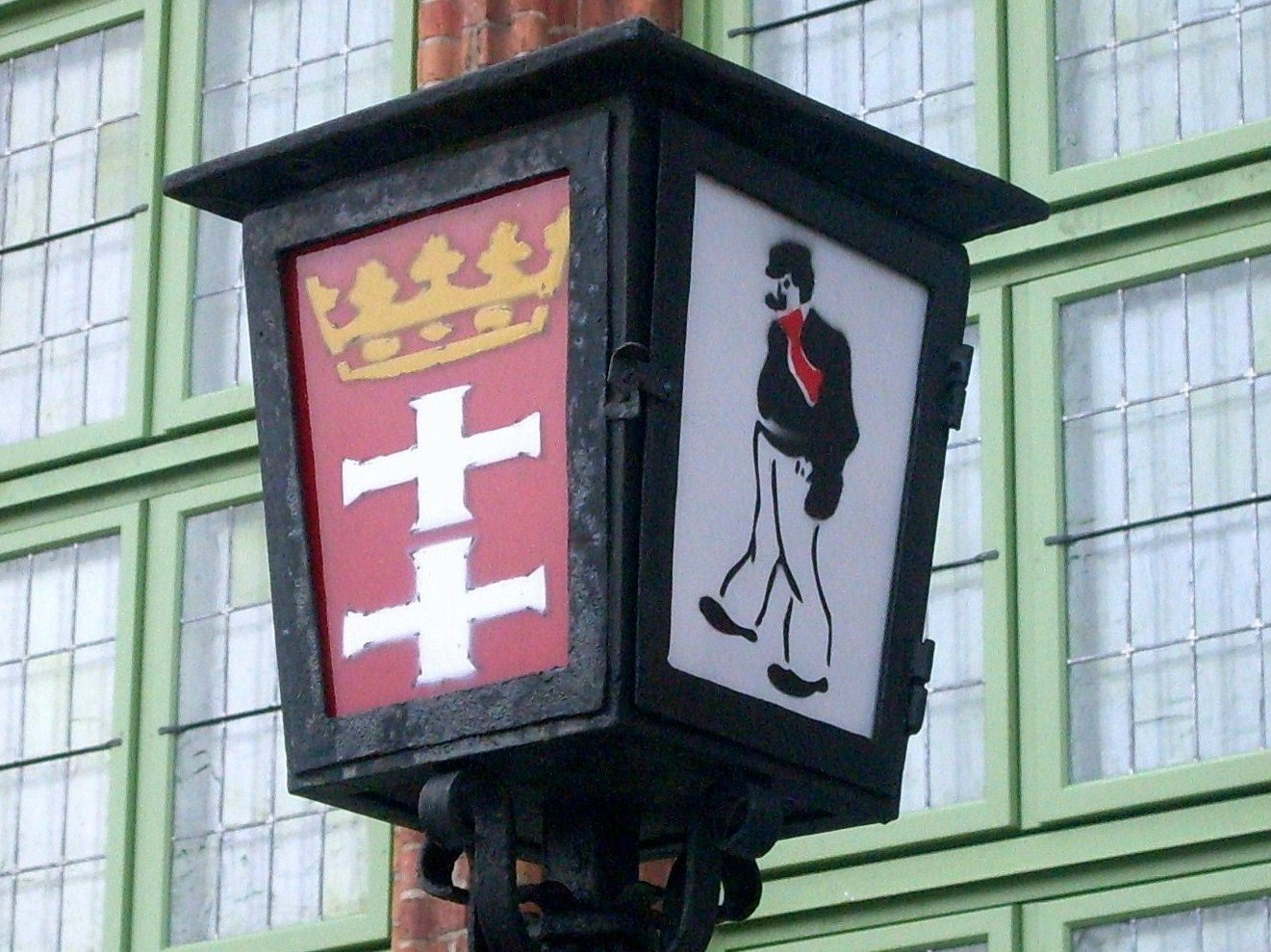 Artystyczna latarnia (herb Gdańska i gdański "bówka") na ulicy Długie Pobrzeże w Gdańsku.